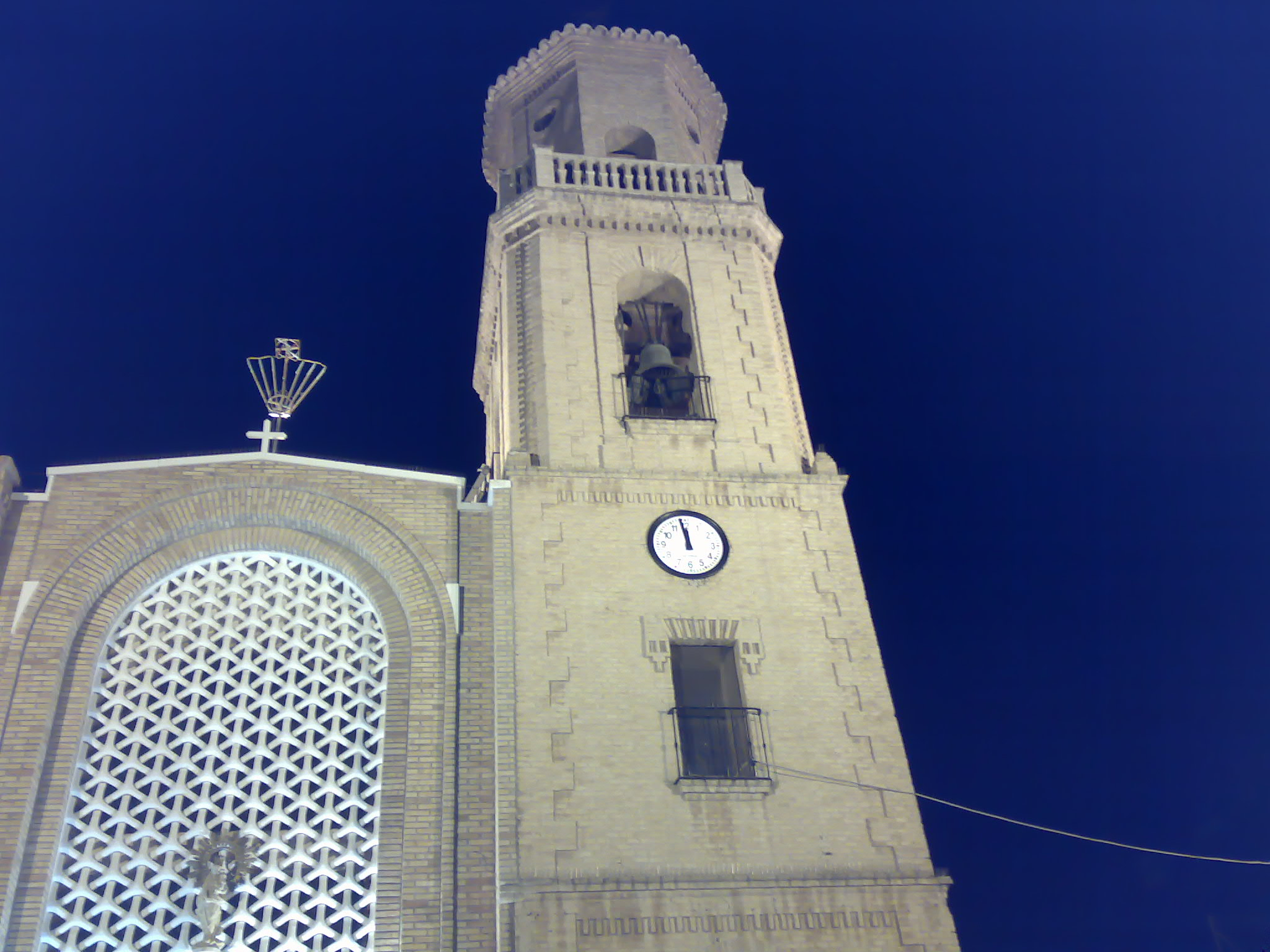 Nochevieja a la Iglesia. Pilar de la Horadada, Alicante (España)